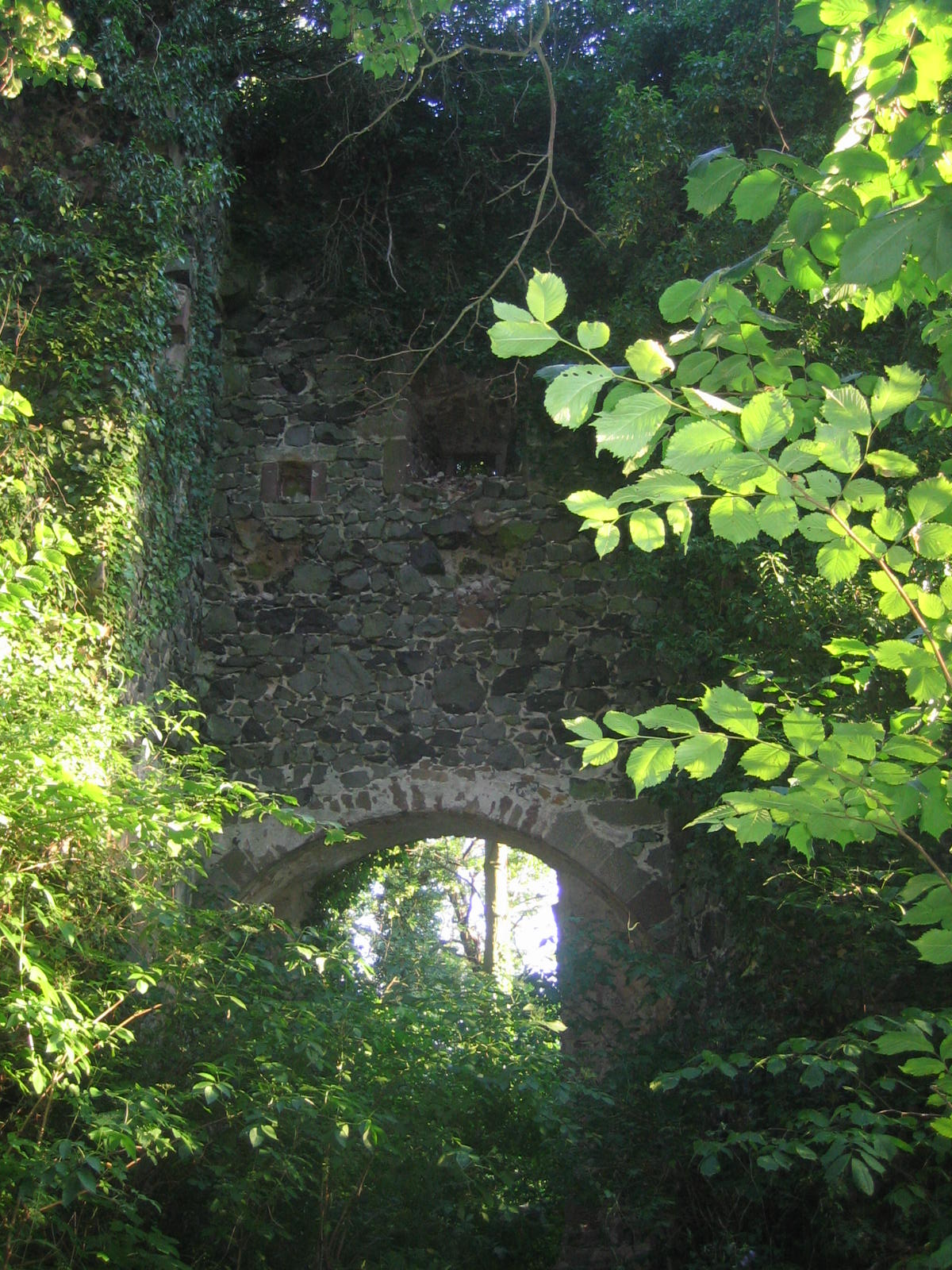 Burgruine Falkenberg bei Homberg an der Efze in Nordhessen